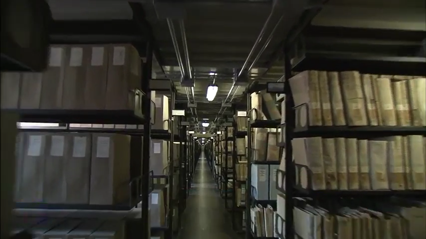 Corridoio e scaffali all'interno dell'Archivio segreto vaticano